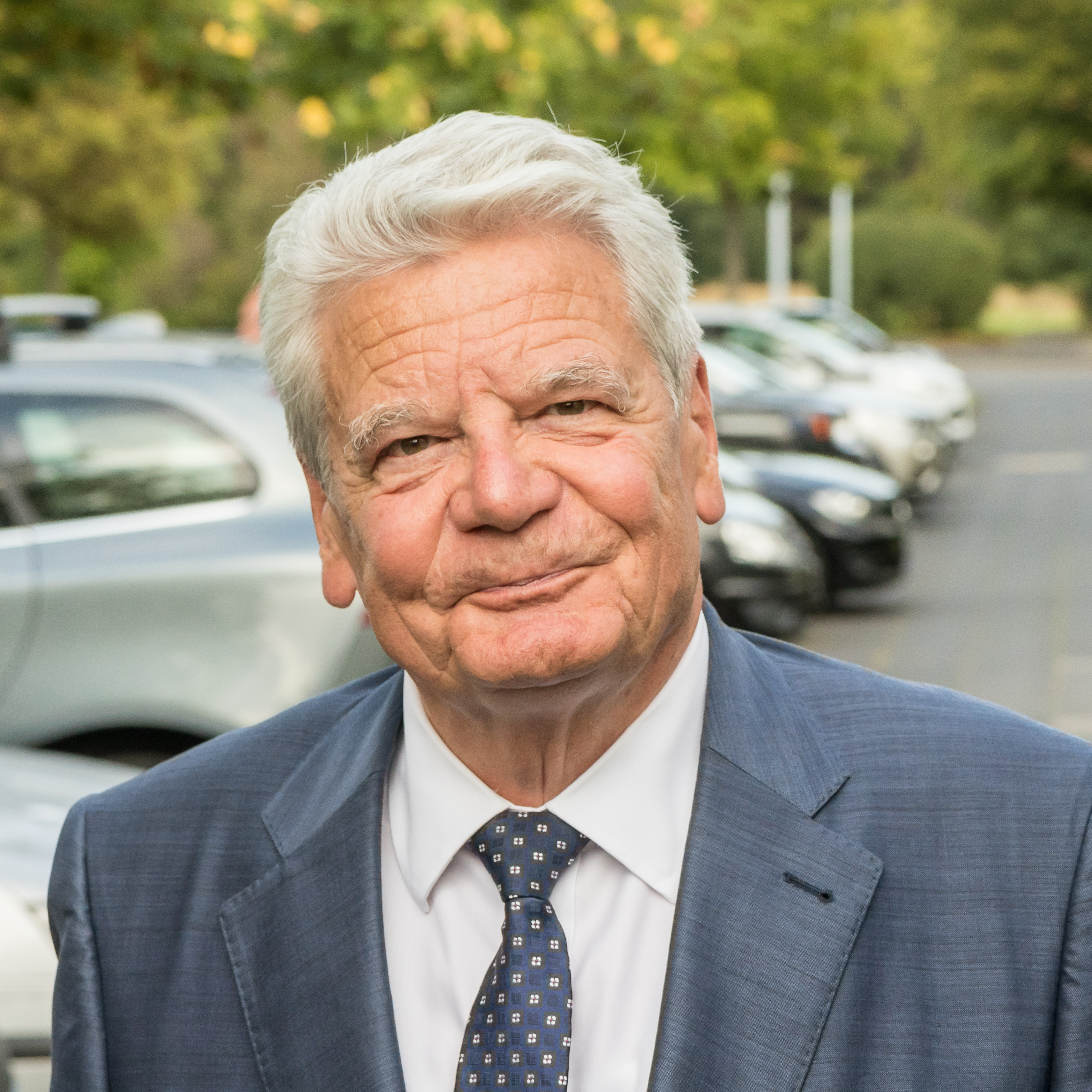 MAISCHBERGER am 14. August 2019 in Köln. Produziert vom WDR. Sommerstaffel „maischberger. die woche“ Foto: Joachim Gauck, Bundespräsident a.D. vor dem Studio